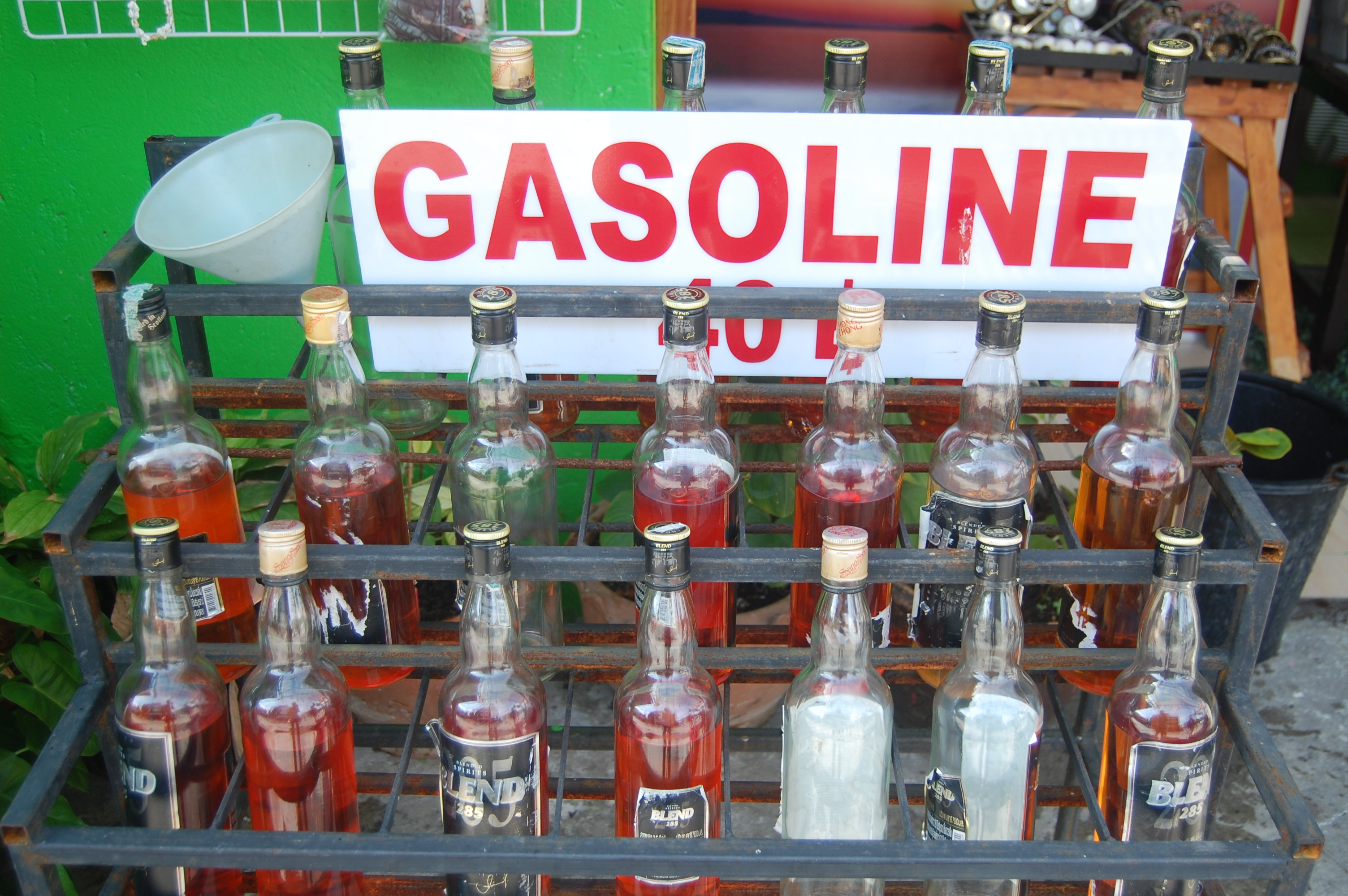 Gasoline for Sale in Phuket